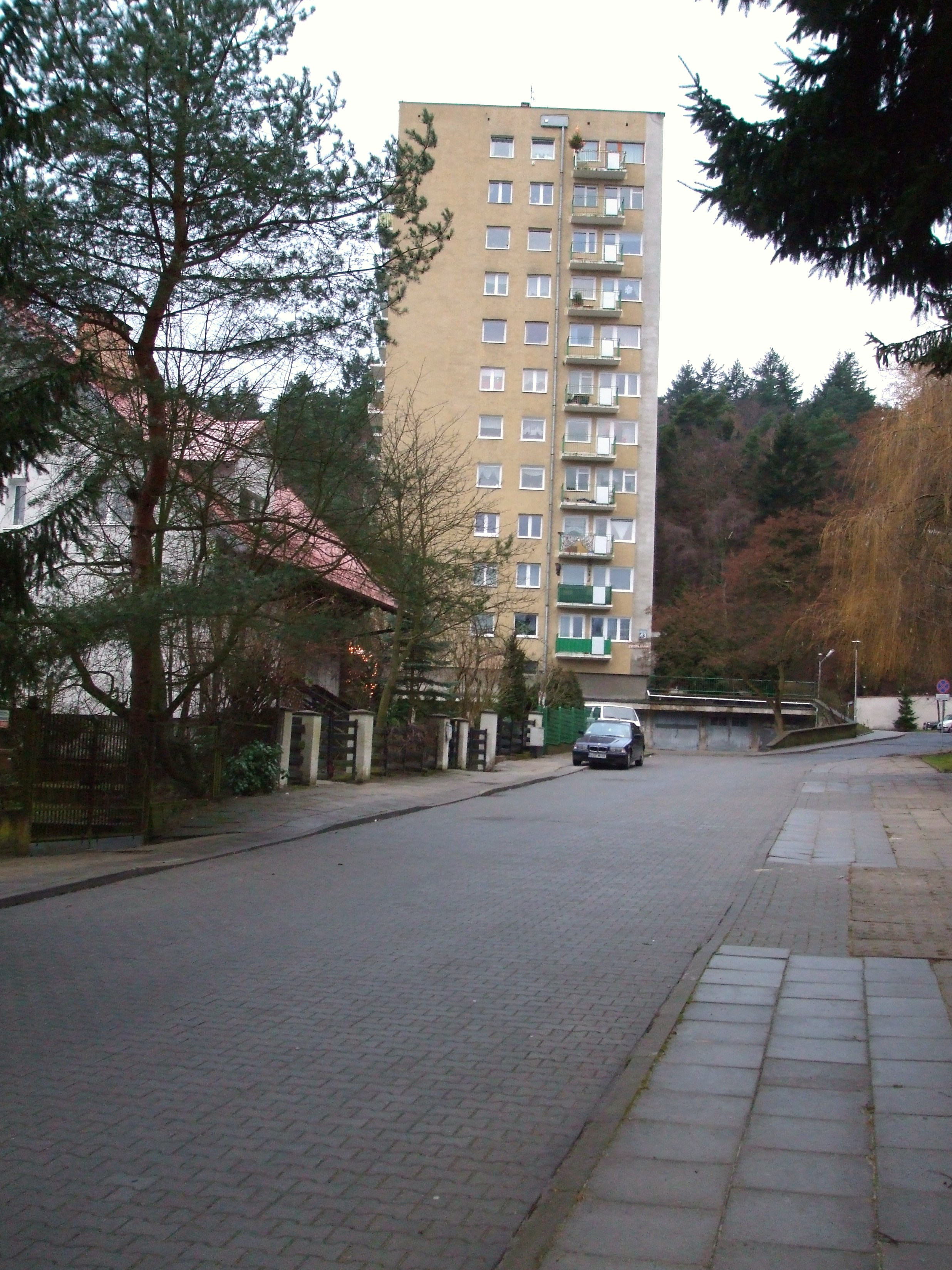 Sopot (Osiedle Mickiewicza), ul. Stefana Żeromskiego.